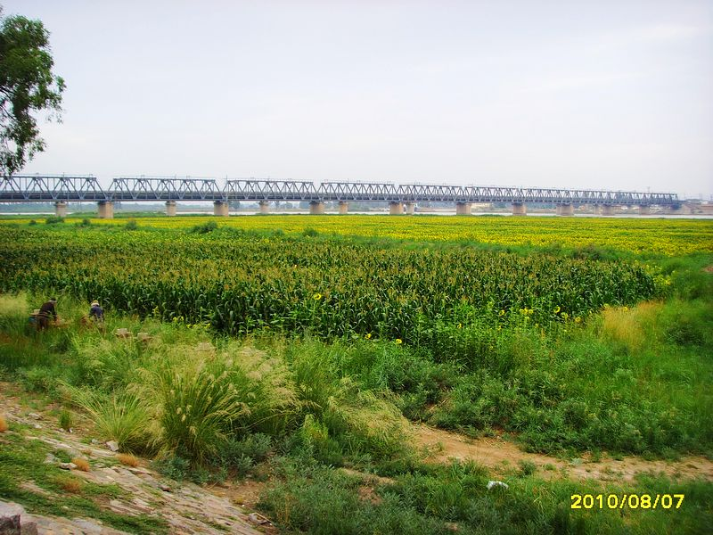 黄河铁路大桥